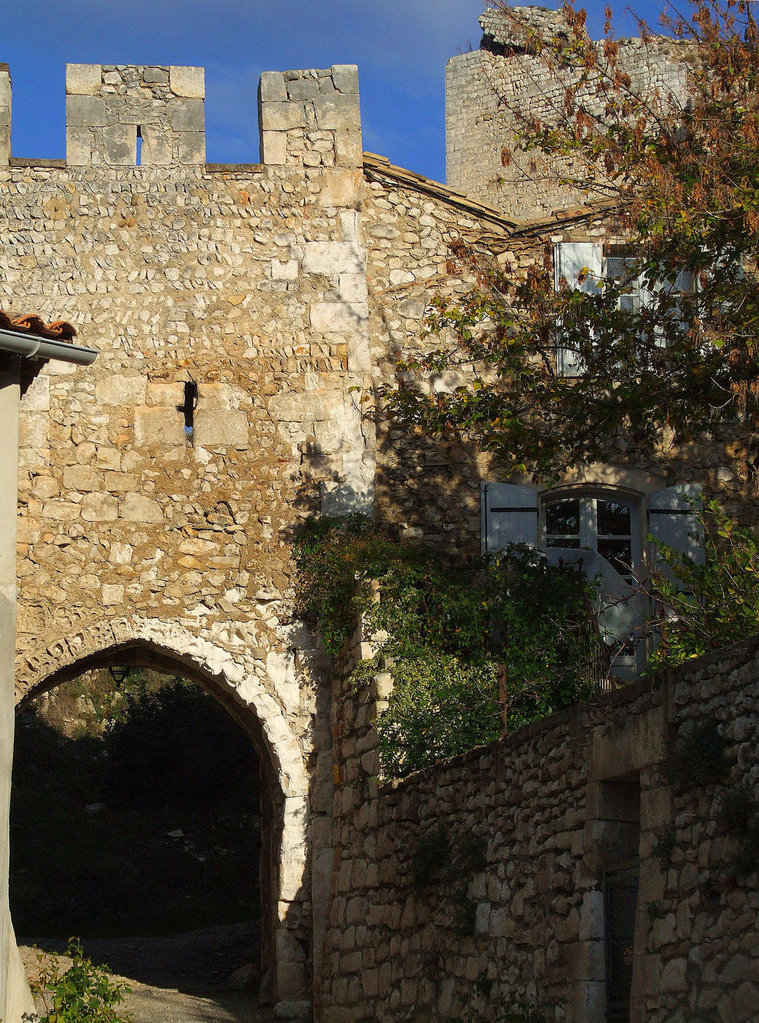 Orgon (Bouches-du-Rhône, France) - La porte de l'Hortet (10.12.2006)